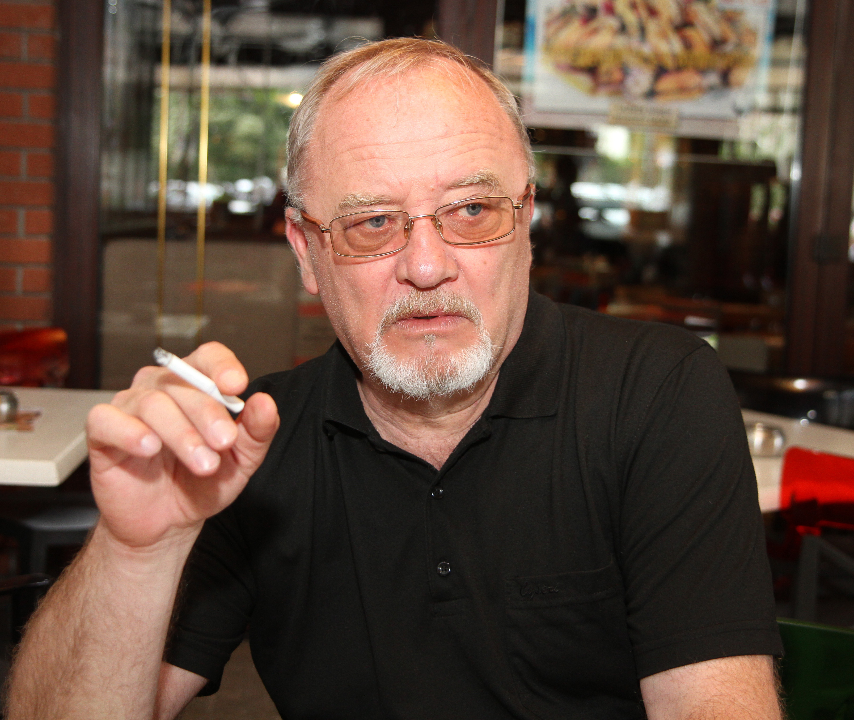 проф. Людмил Георгиев